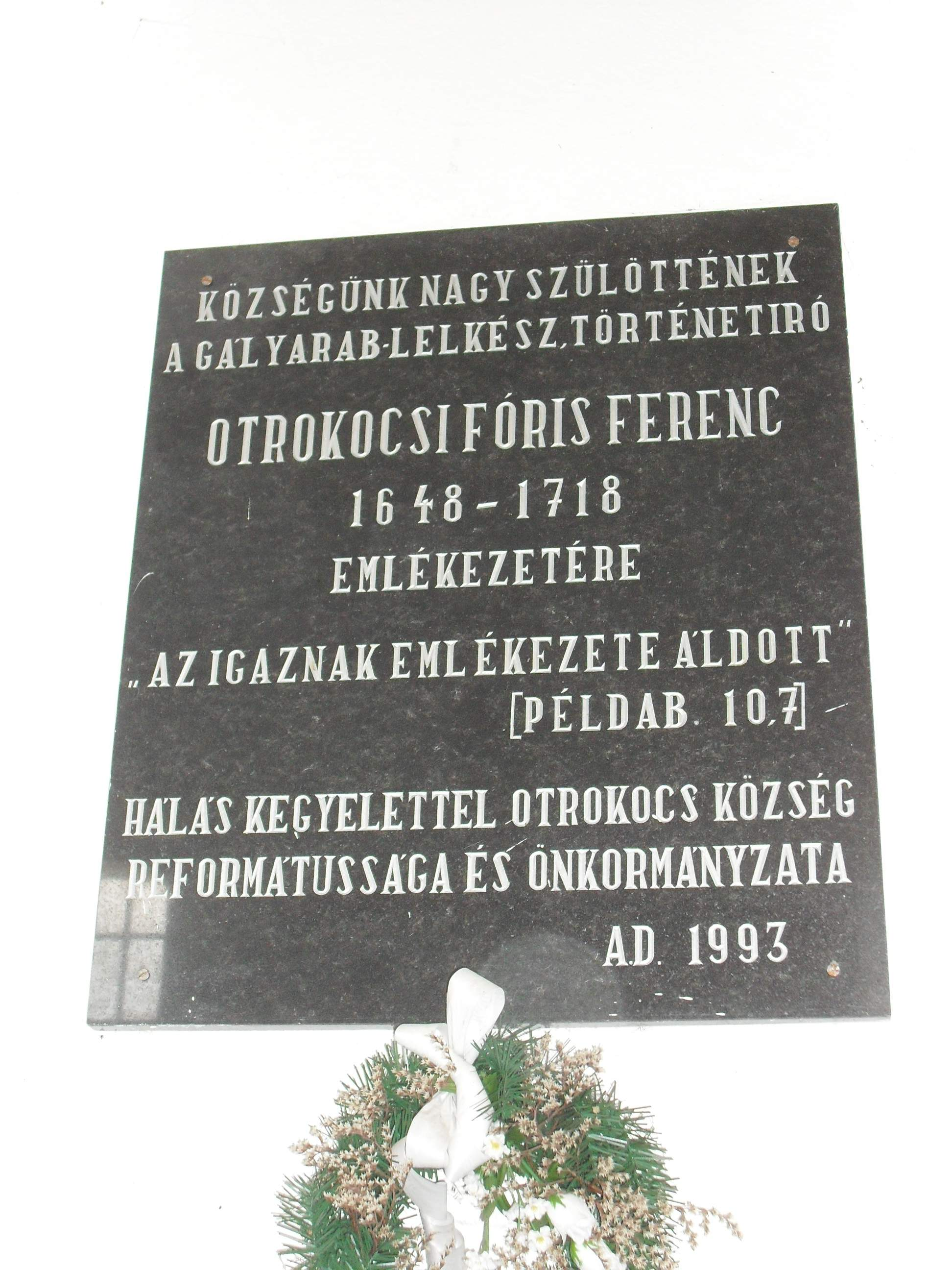 Otrokocs - Otrokocsi Fóris Ferenc emléktáblája a református templomban